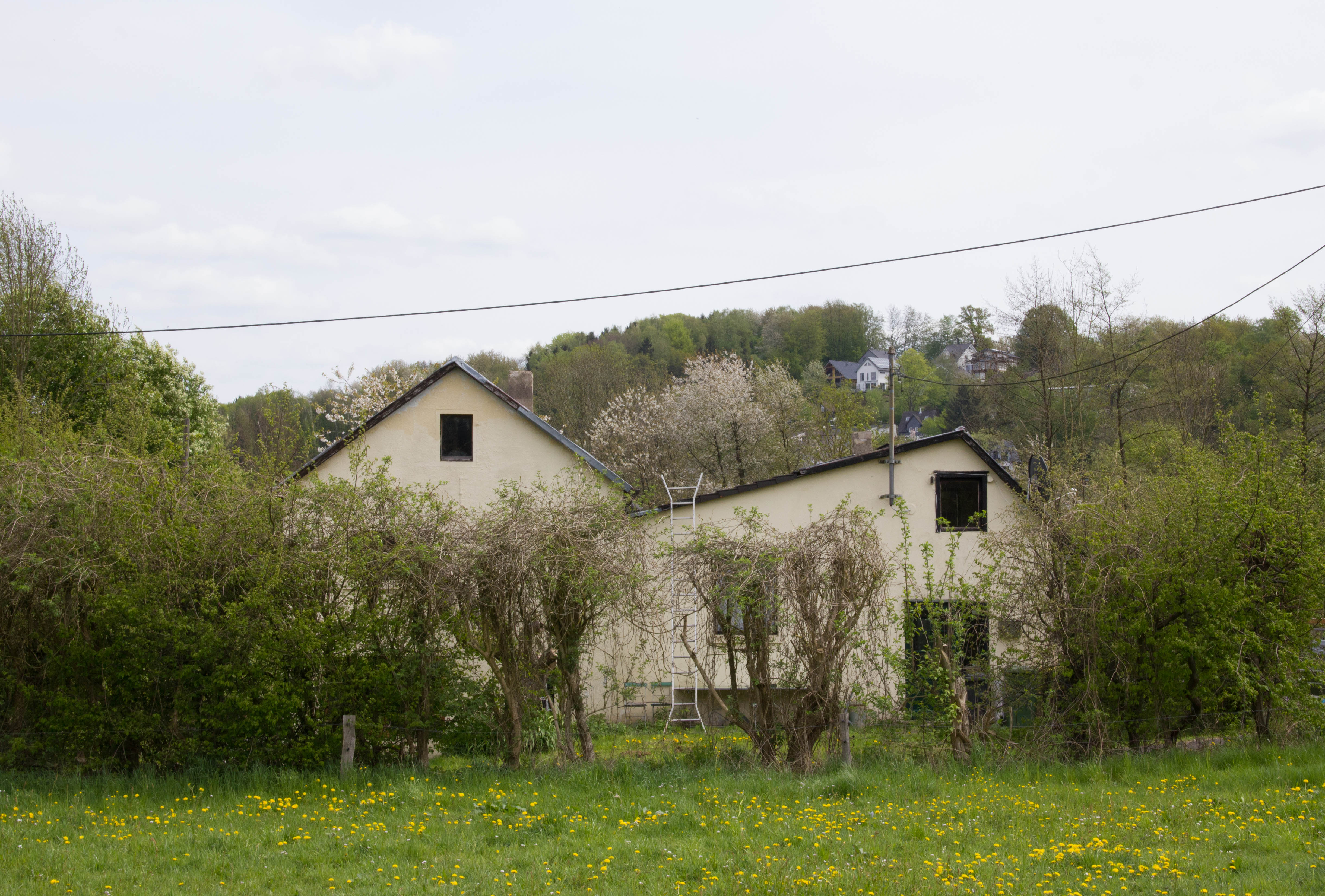 altes Brückenhaus in Schiffart am 29. April 2015